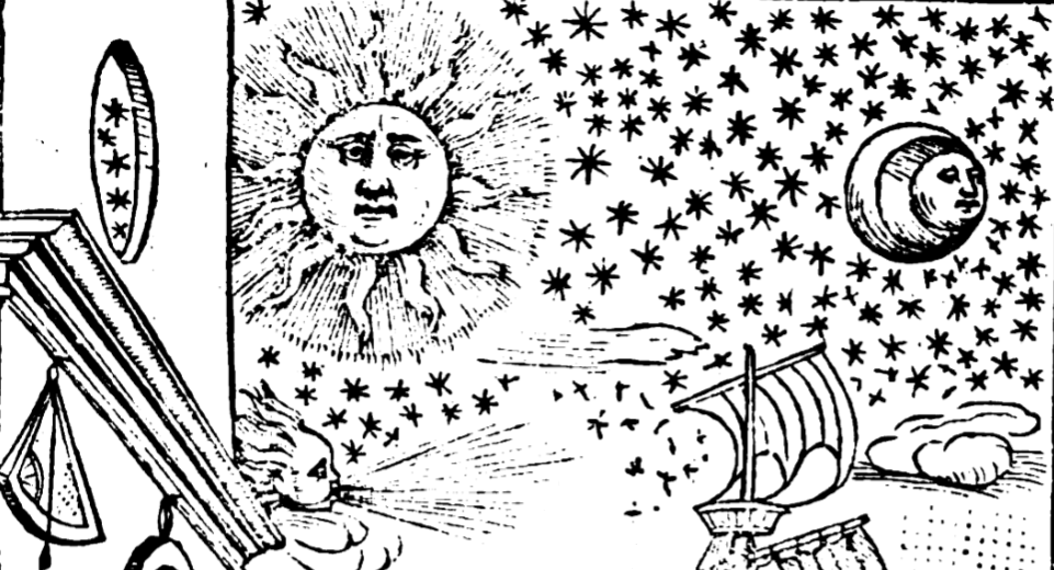 Raffigurazioni del Sole, della Luna, delle stelle e dei venti, all'interno della traduzione del trattato di Joannes de SacroBosco del 1230, intitolata Sphera volgare novamente tradotta; sottotitolo: con molte notande additioni di geometria, cosmographia, arte navicatoria, et stereometria, proportioni, et qvantita delli elementi, distanze, grandeze, et movimenti di tvtti li corpi celesti, cose certamente rade et maravigliose, stampato a Venezia, per Bartholomeo Zanetti, «anno salutis nostre M. D. XXXVII. mense Ottobri, &c. [Oct. 1537]»